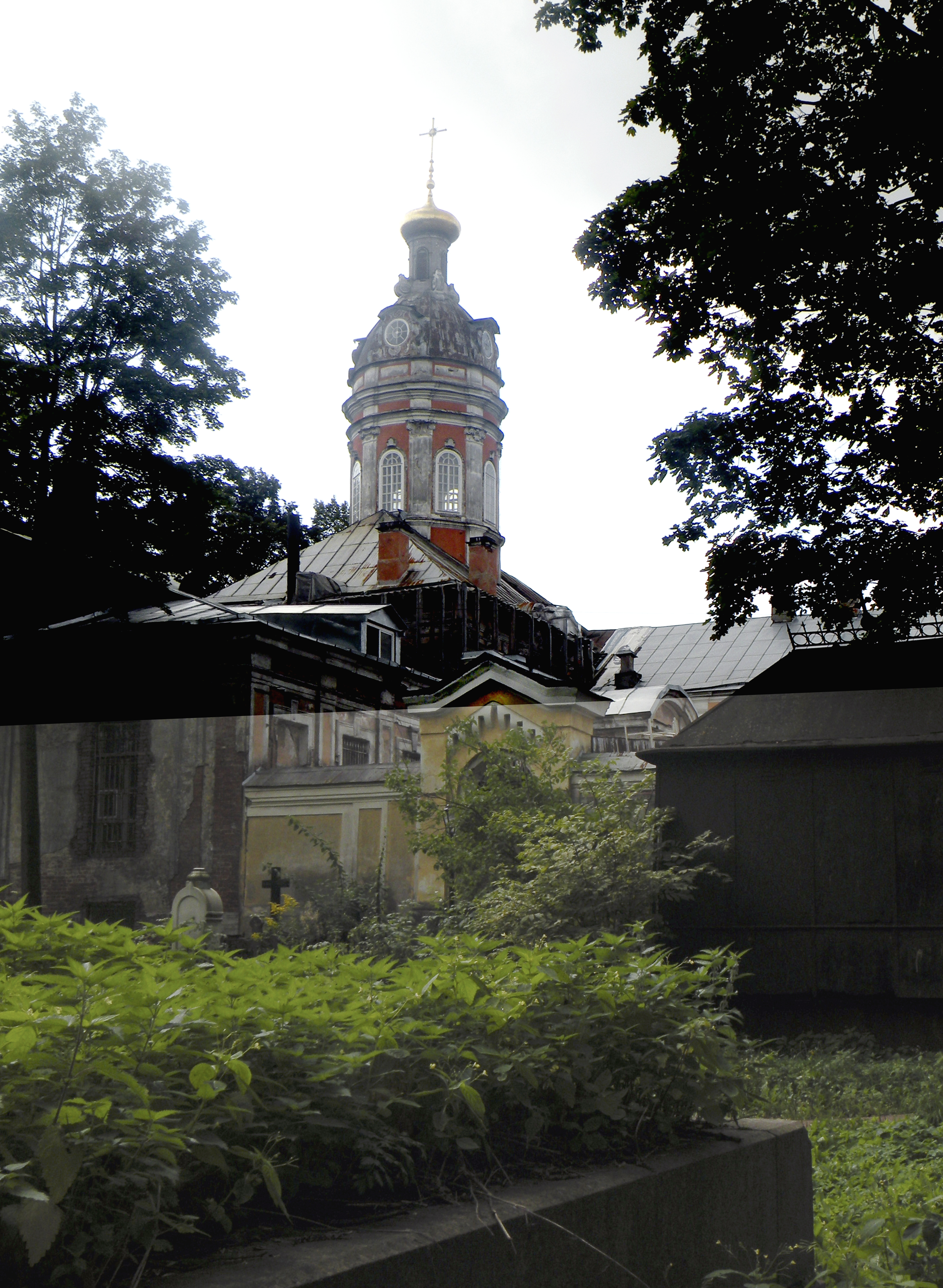 Исидоровская и Фёдоровская церкви Александро-Невской Лавры